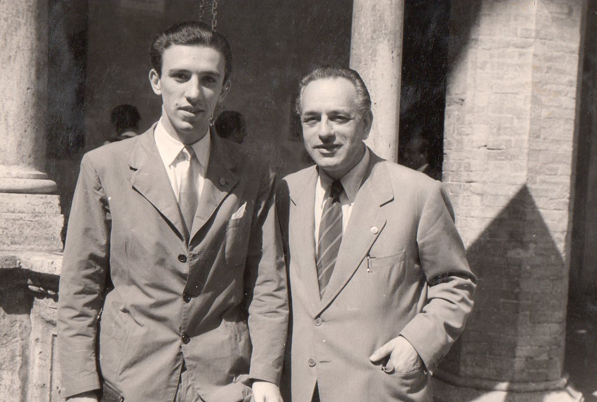 Siena